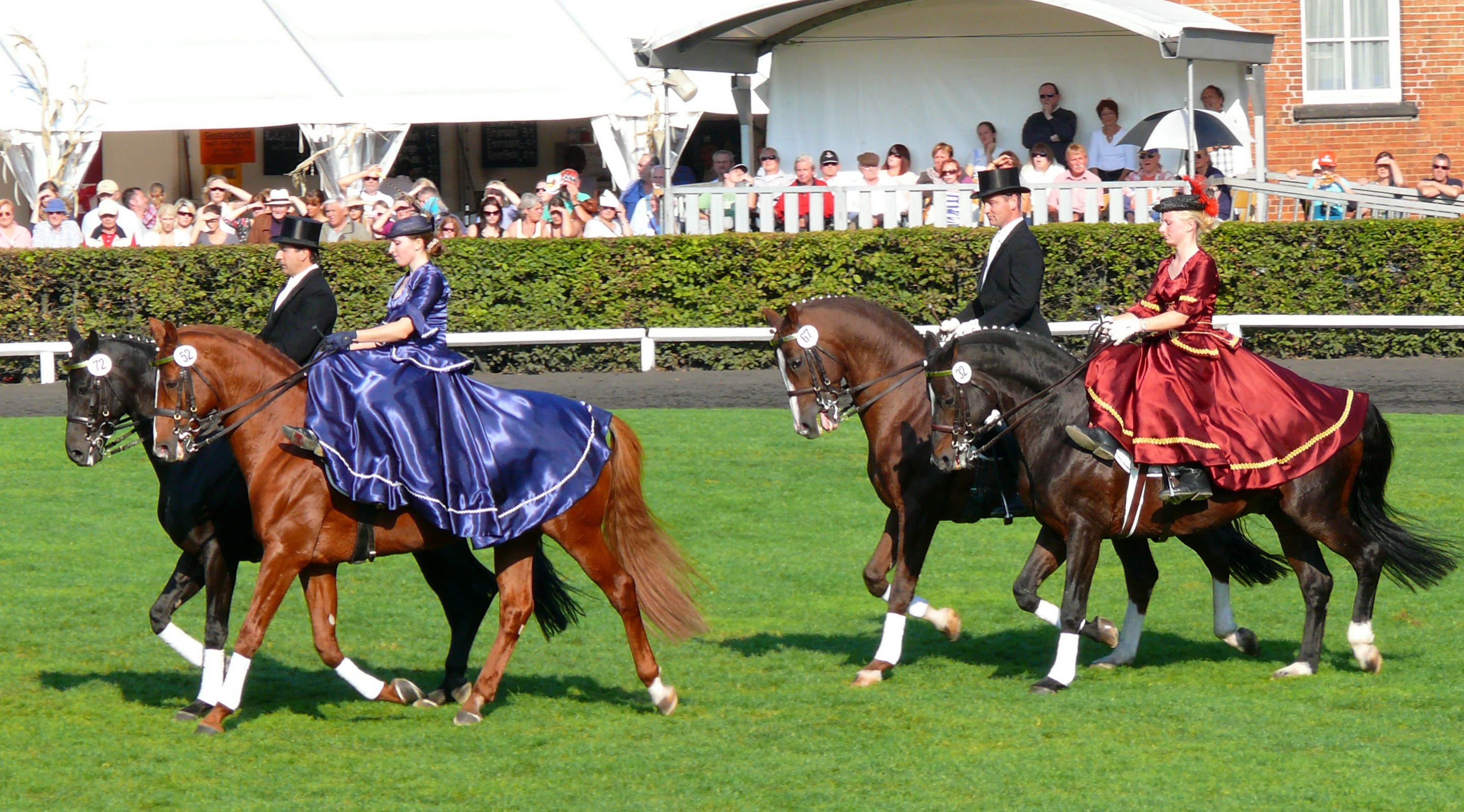 "Eleganz im Damensattel" auf der Celler Hengstparade am 25.9.2011